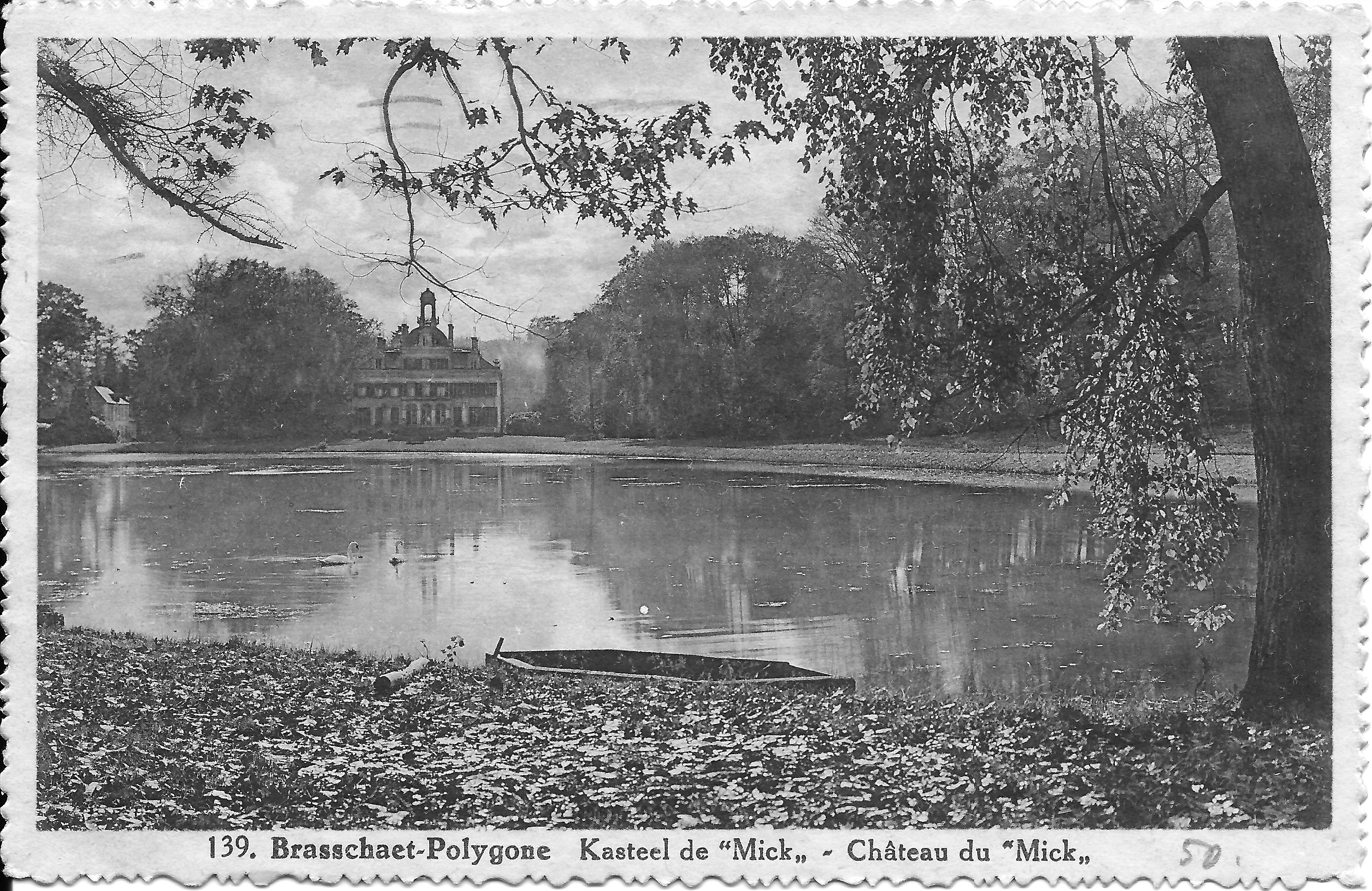 Kasteel de "Mick" met vijver en Amerikaanse eik op de voorgrond. Zie ook: [1] en [2]